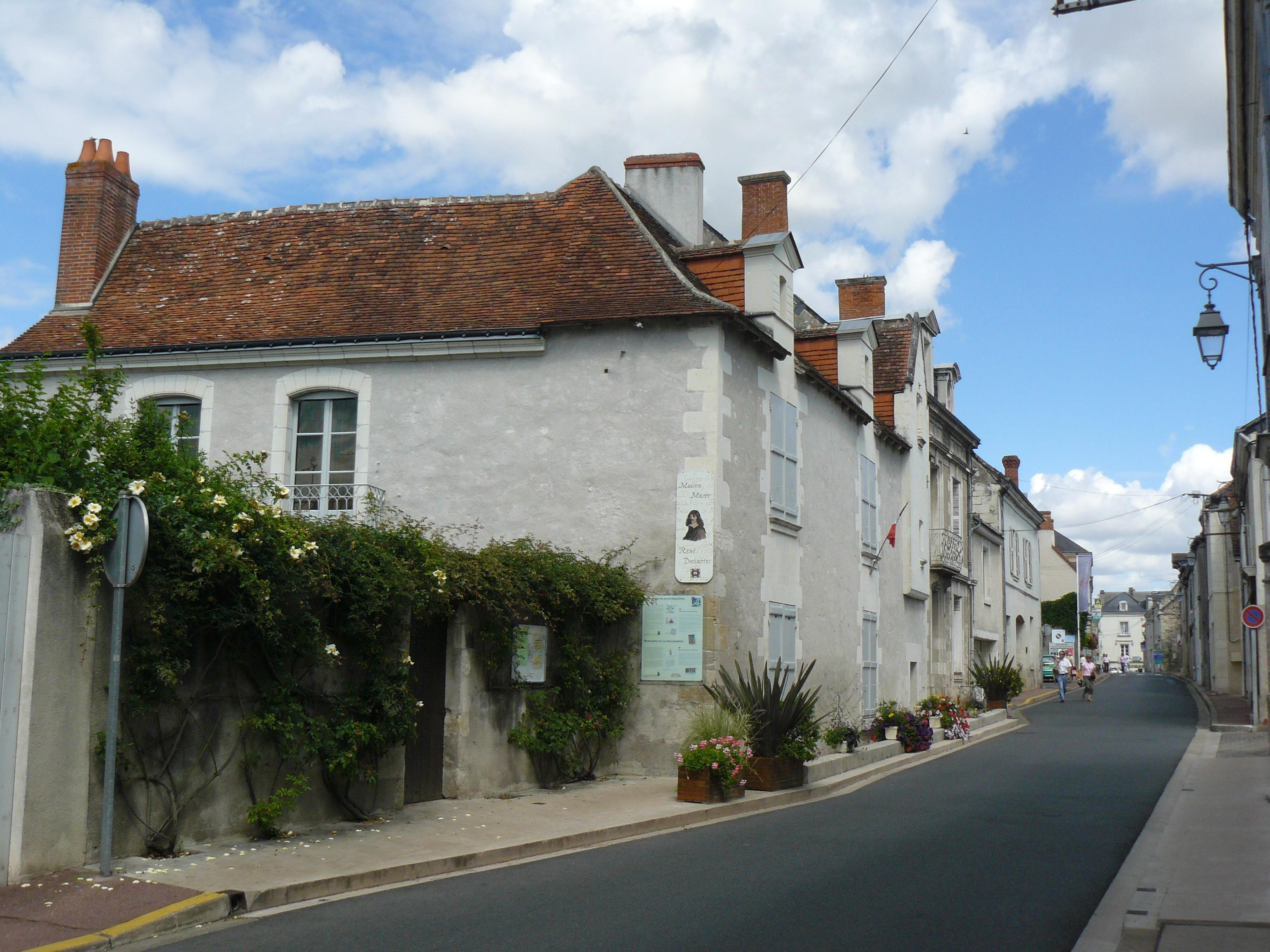 maison natale de René DESCARTES